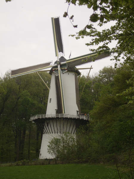 Windmolen "Het Fortuin" in Openluchtmuseum Arnhem